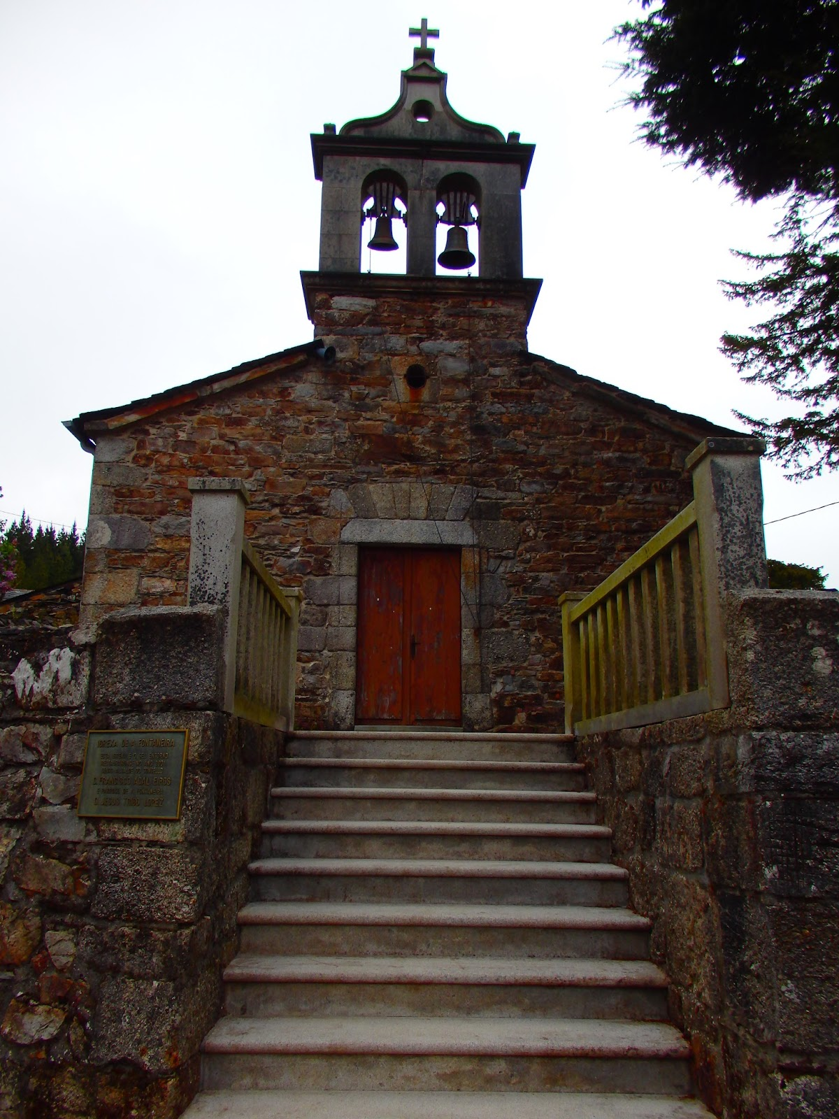 Fachada da igrexa da Fontaneira, Baleira.